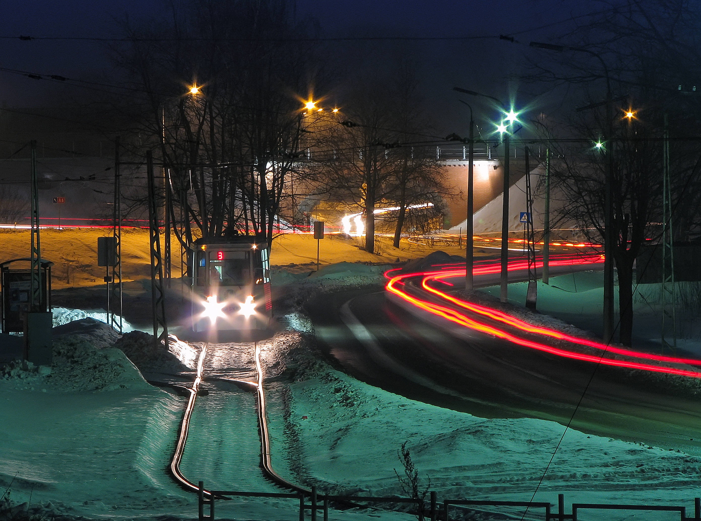 последний трамвай